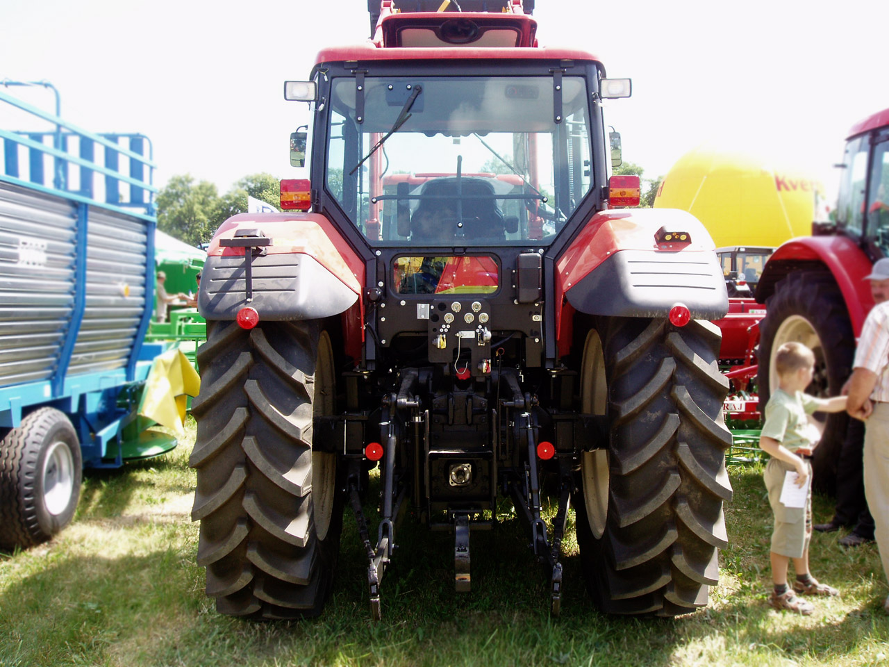 Zetor Forterra od tyłu. Nieznany typ.